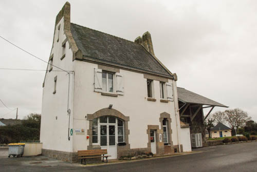 Ancienne gare de Saint-Nic (29)